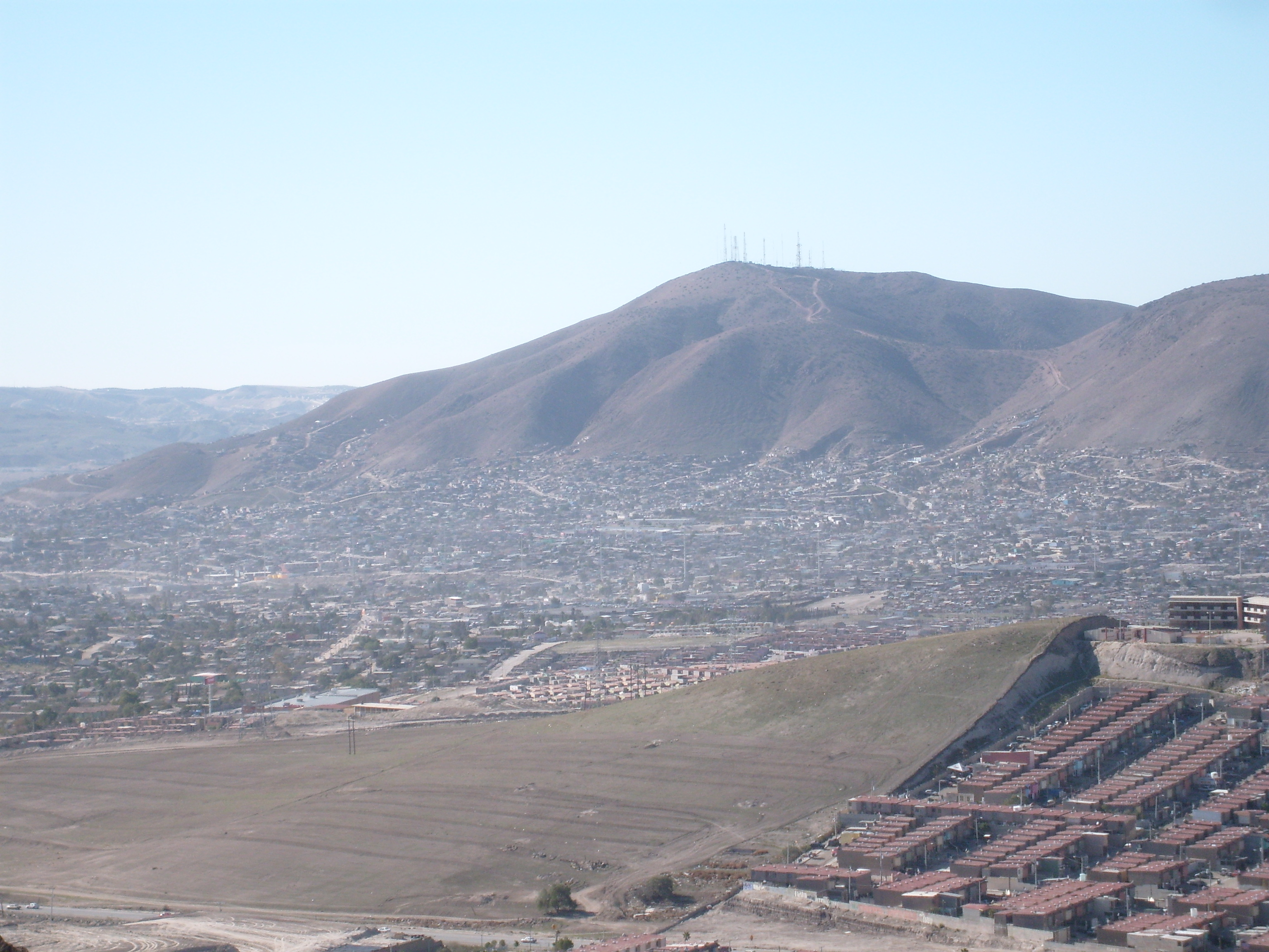 cerro colorado tijuana